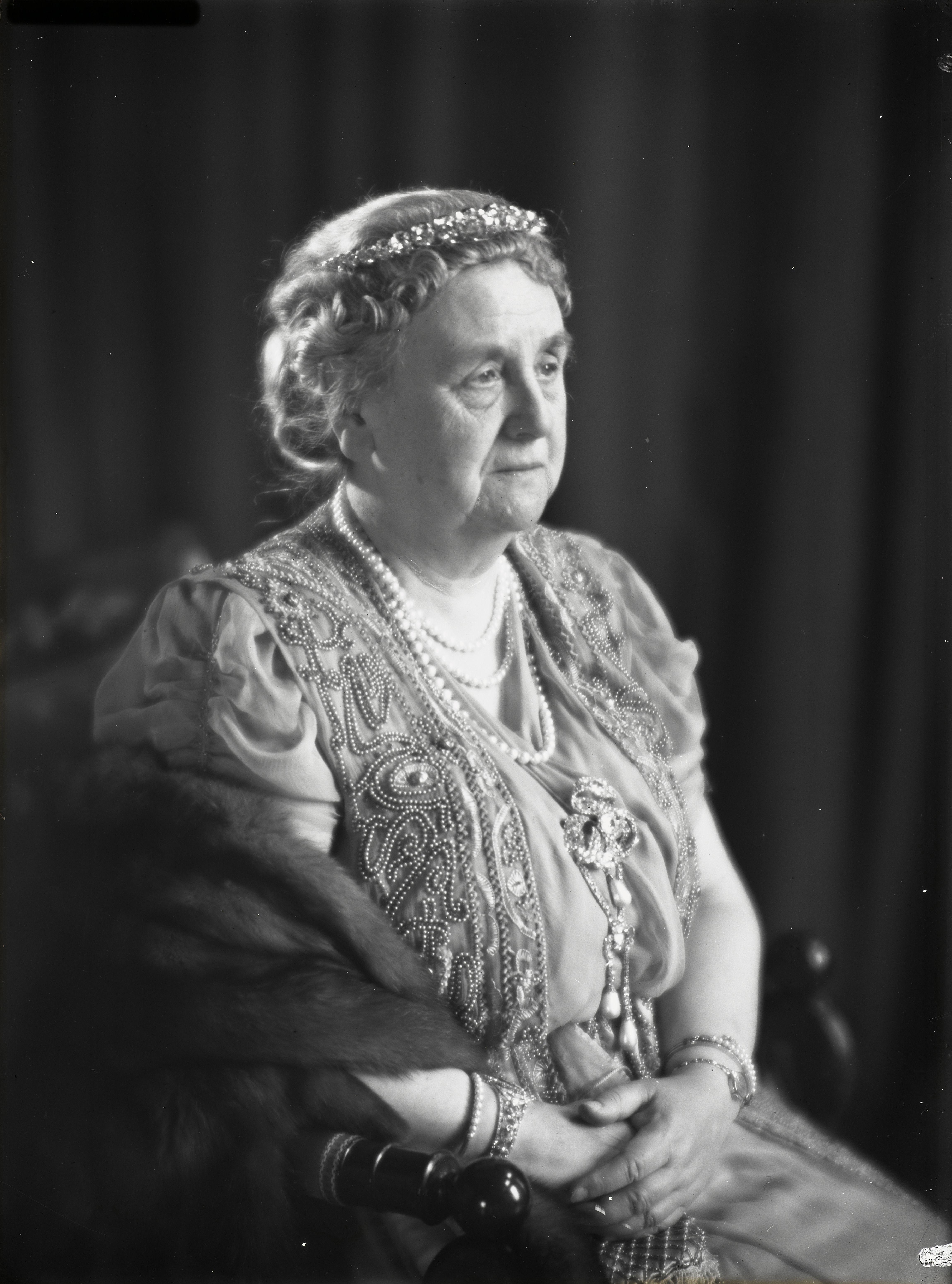 Beschrijving Koningin Wilhelmina ten halve lijve met het hoofd naar links Documenttype foto Vervaardiger Merkelbach, Atelier J. Collectie Collectie Atelier J. Merkelbach Datering 1948 ca. Inventarissen Afbeeldingsbestand 010164033306 Generated with Dememorixer